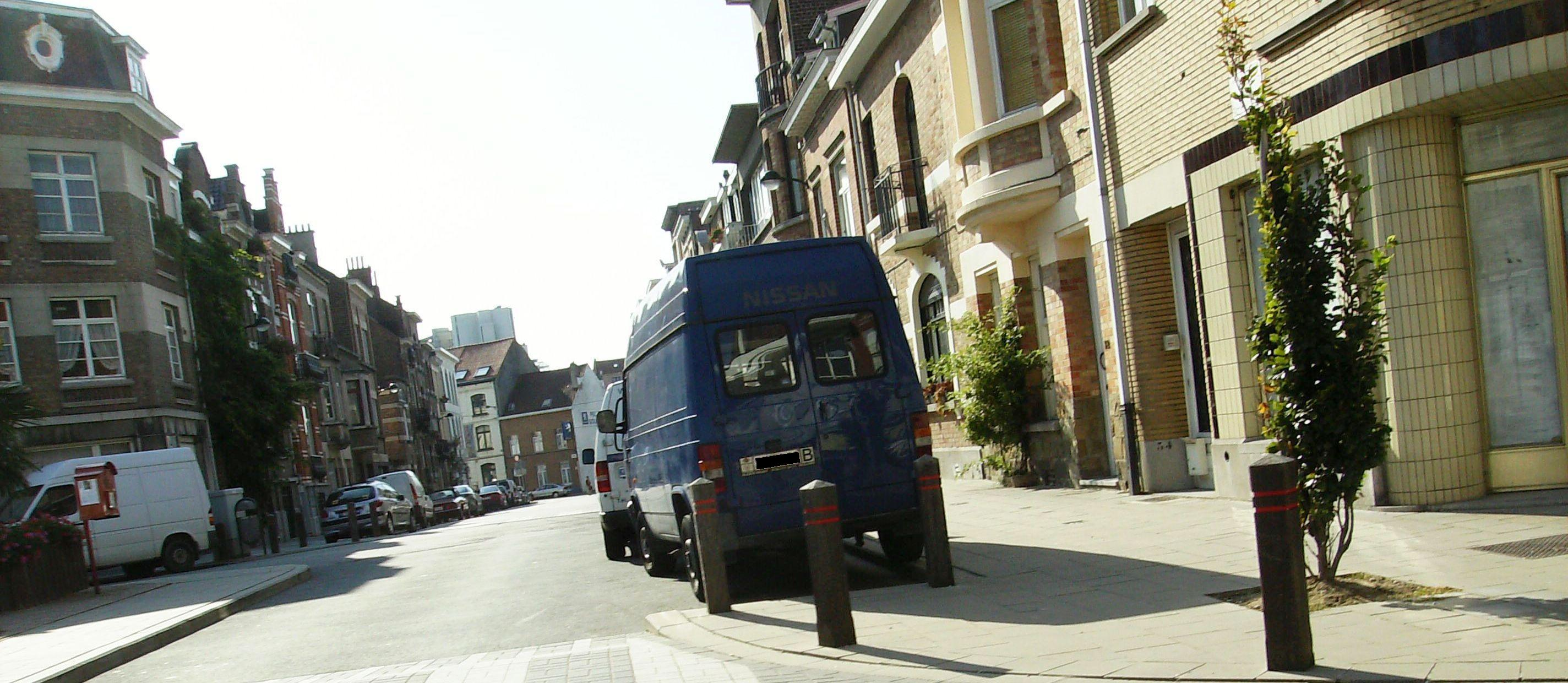 avenue Charles Madoux Auderghem